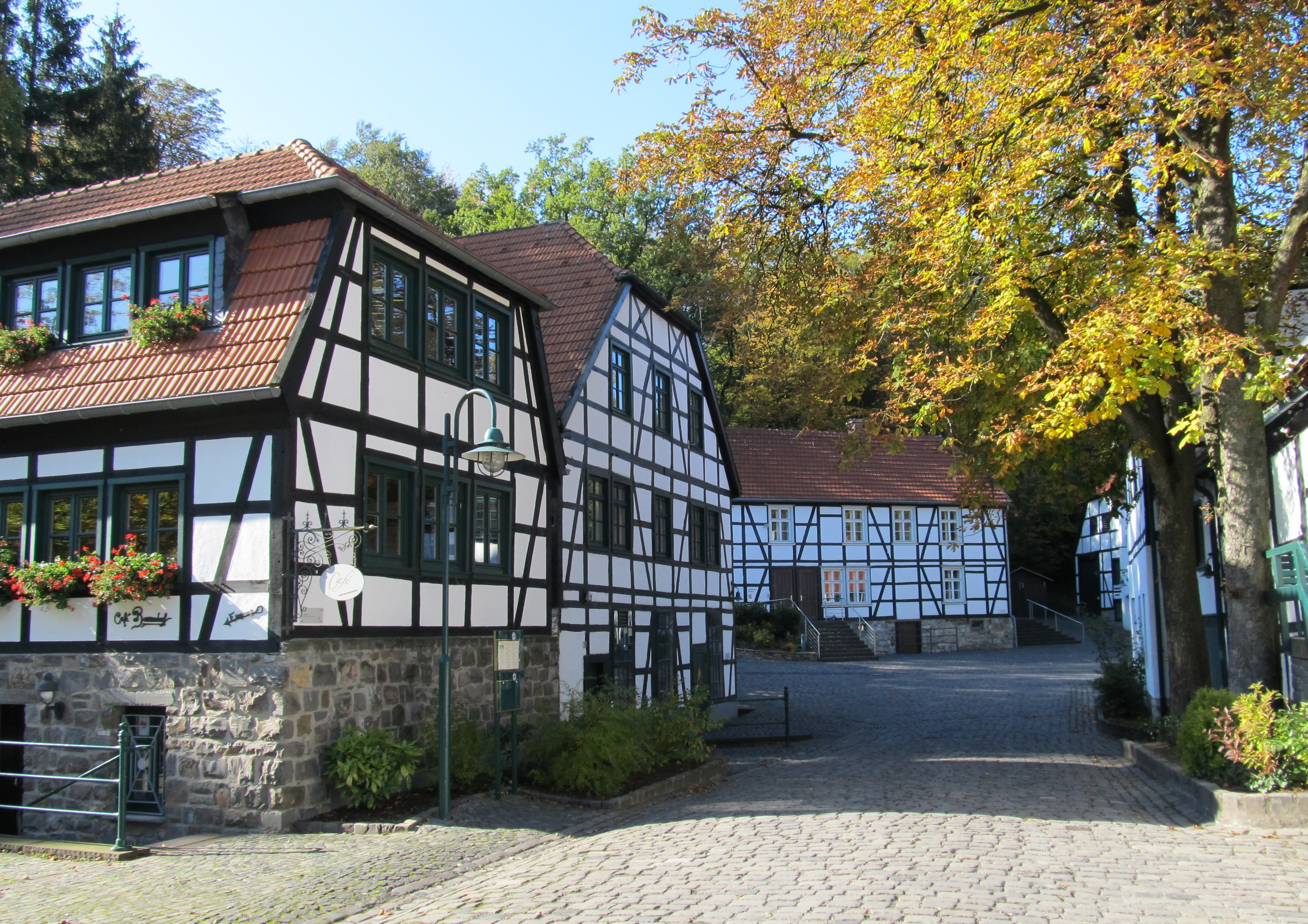 Fabrikenanlage Maste-Barendorf, Iserlohn (Germany)